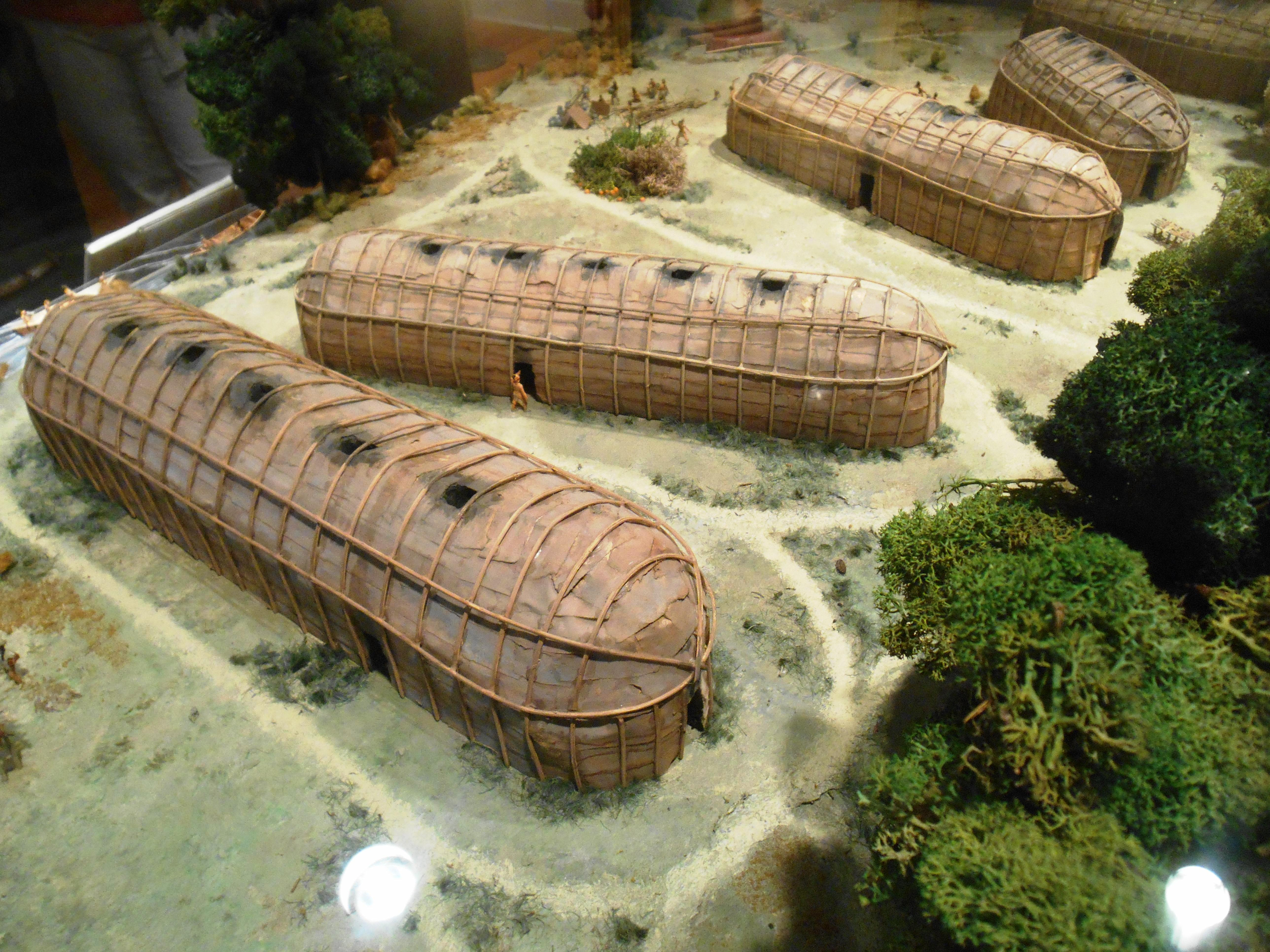 Maquette d'un village iroquoien, au Château Ramezay